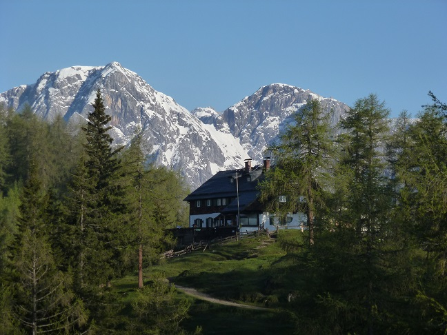 Die Ostpreußenhütte im Juni 2013 fotografiert von der "Gott-sei-Dank"-Bank